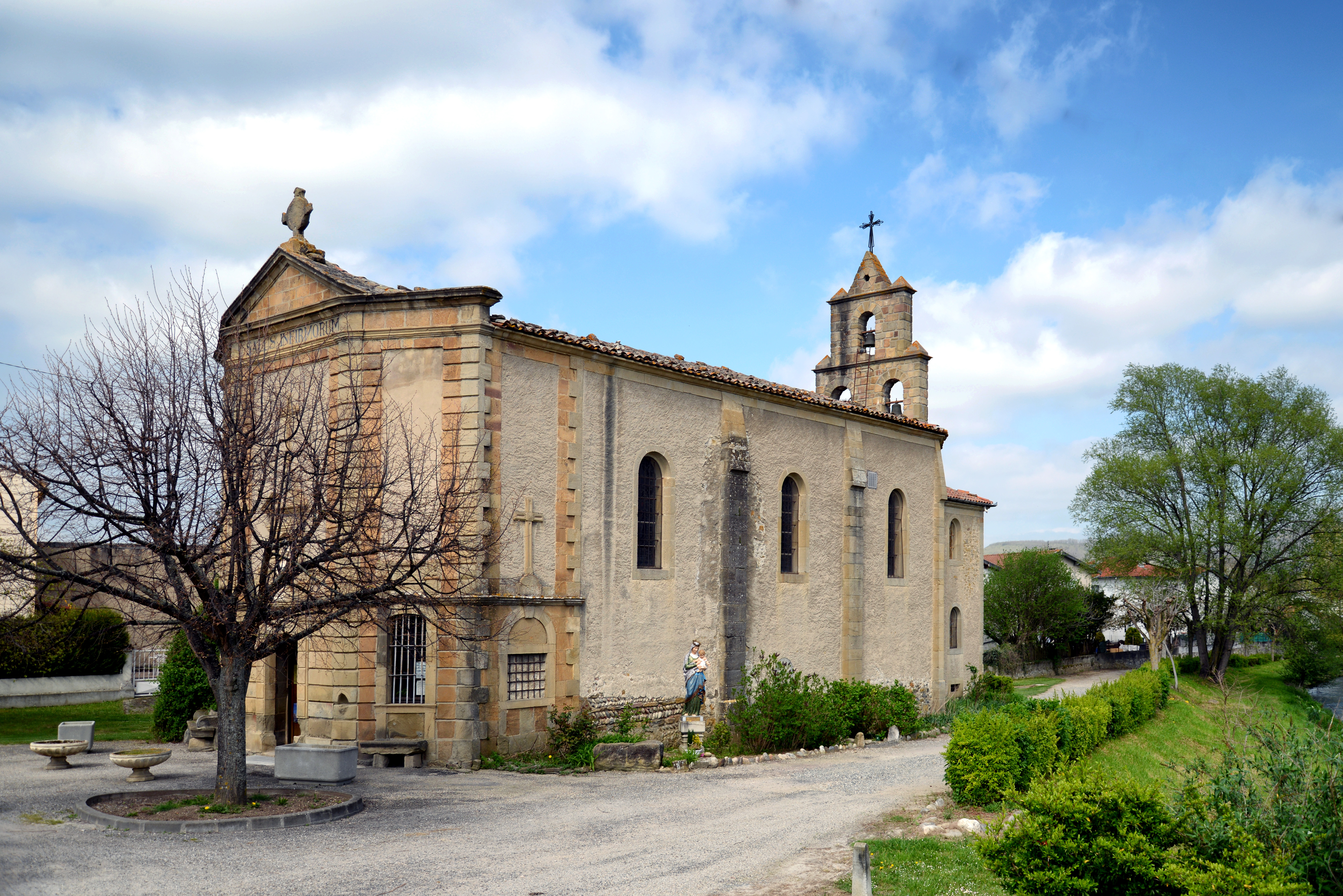 Laroque-d'Olmes, Arière (Midi-Pyrénées) - Chapelle Notre-Dame du Pont